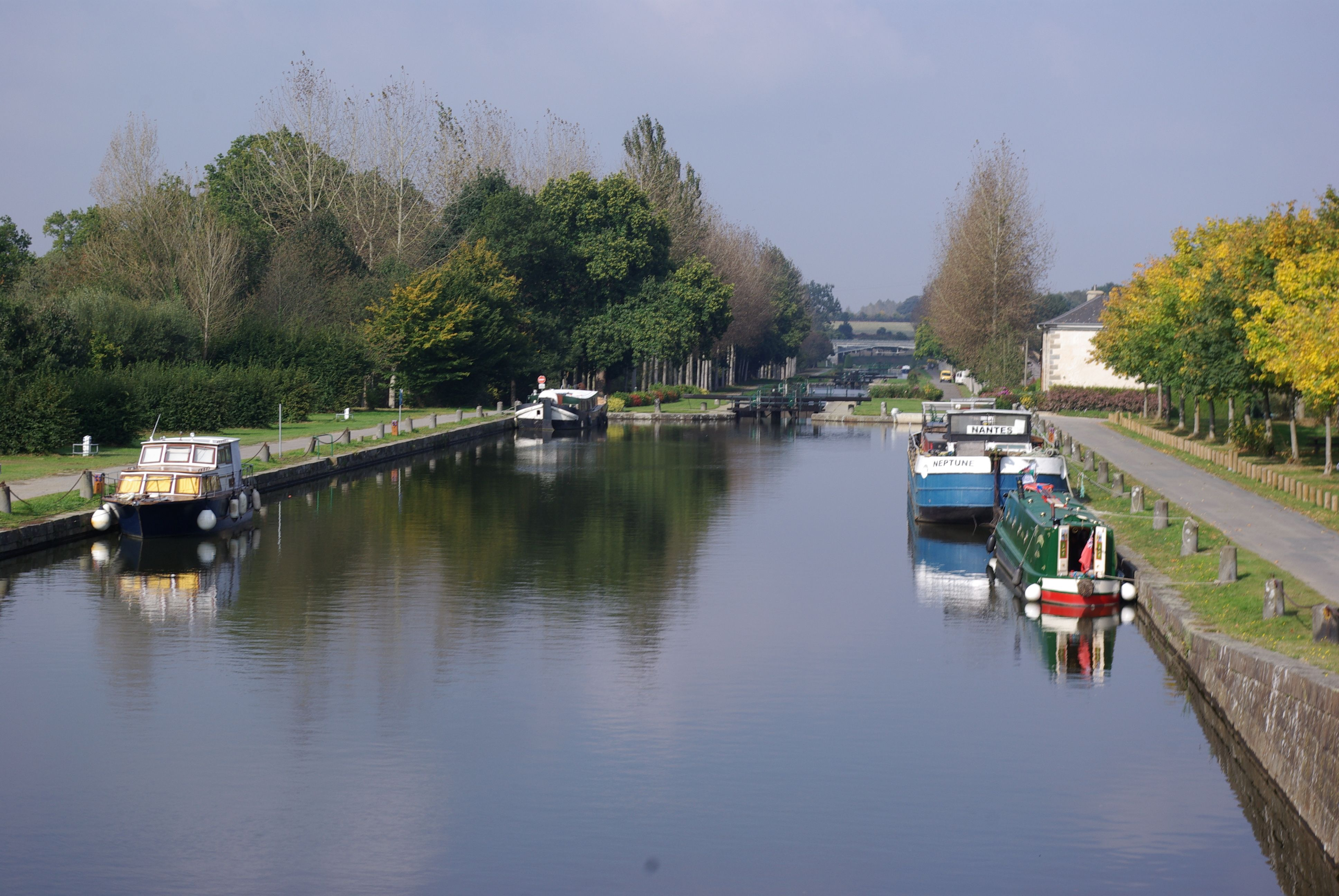 Hédé in der Bretagne, Frankreich. Der Canal d'Ille-et-Rance geht hier über 11 Schleusen (geotags in de EXIF-Daten).